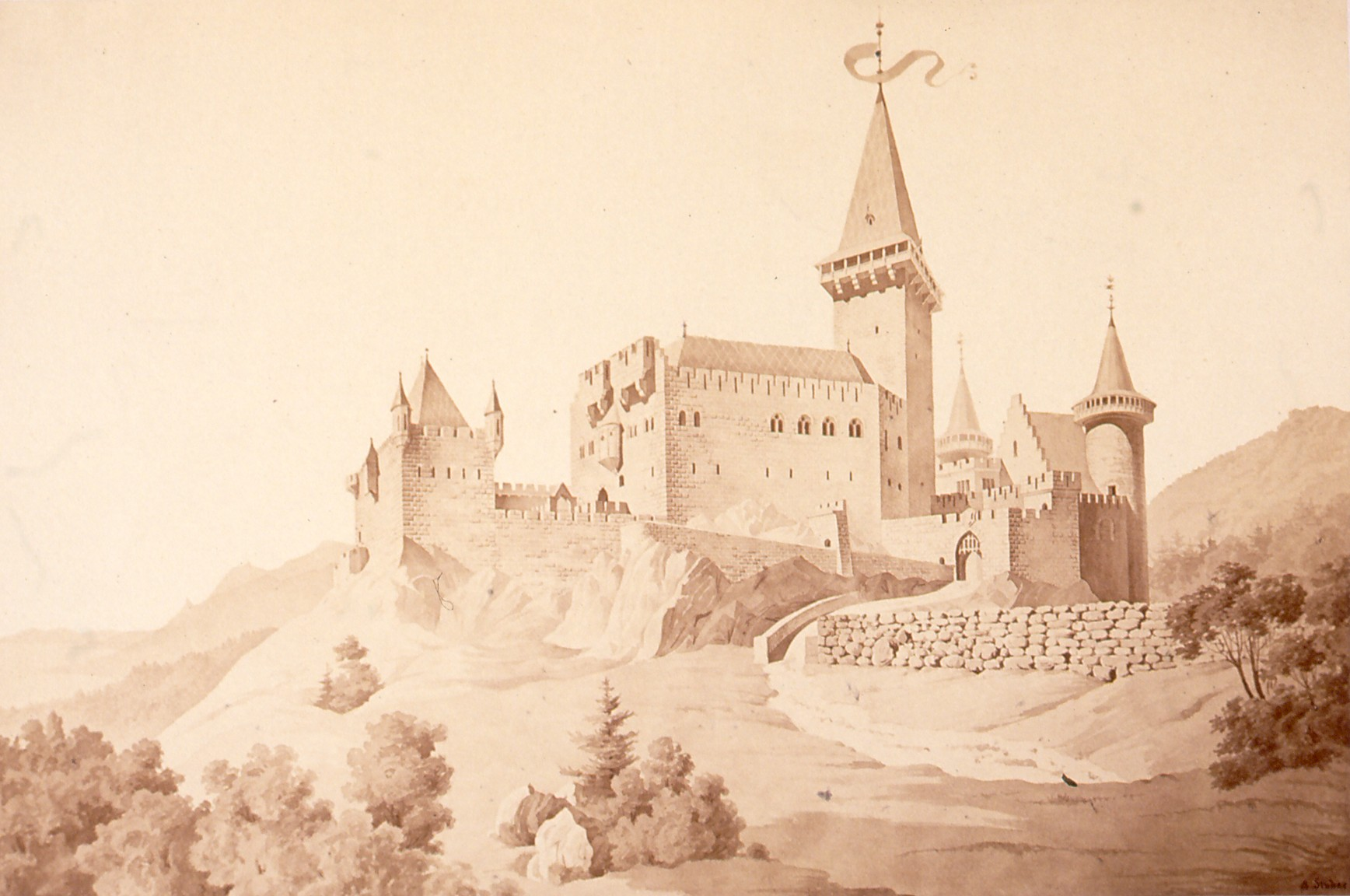 Rekonstruktion der Burg Landsberg im Elsass, Blick von Osten